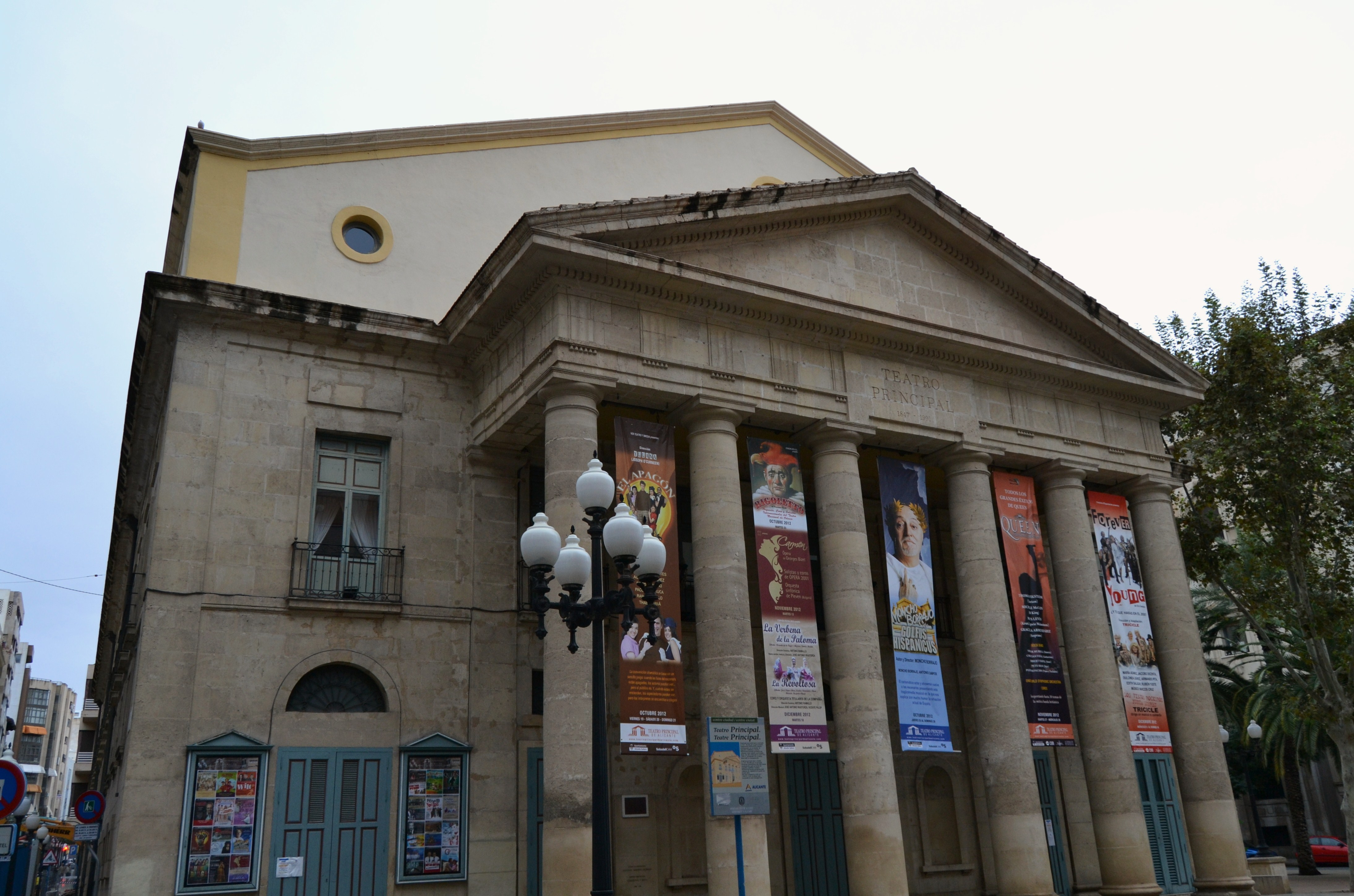 Teatre Principal - Alacant.